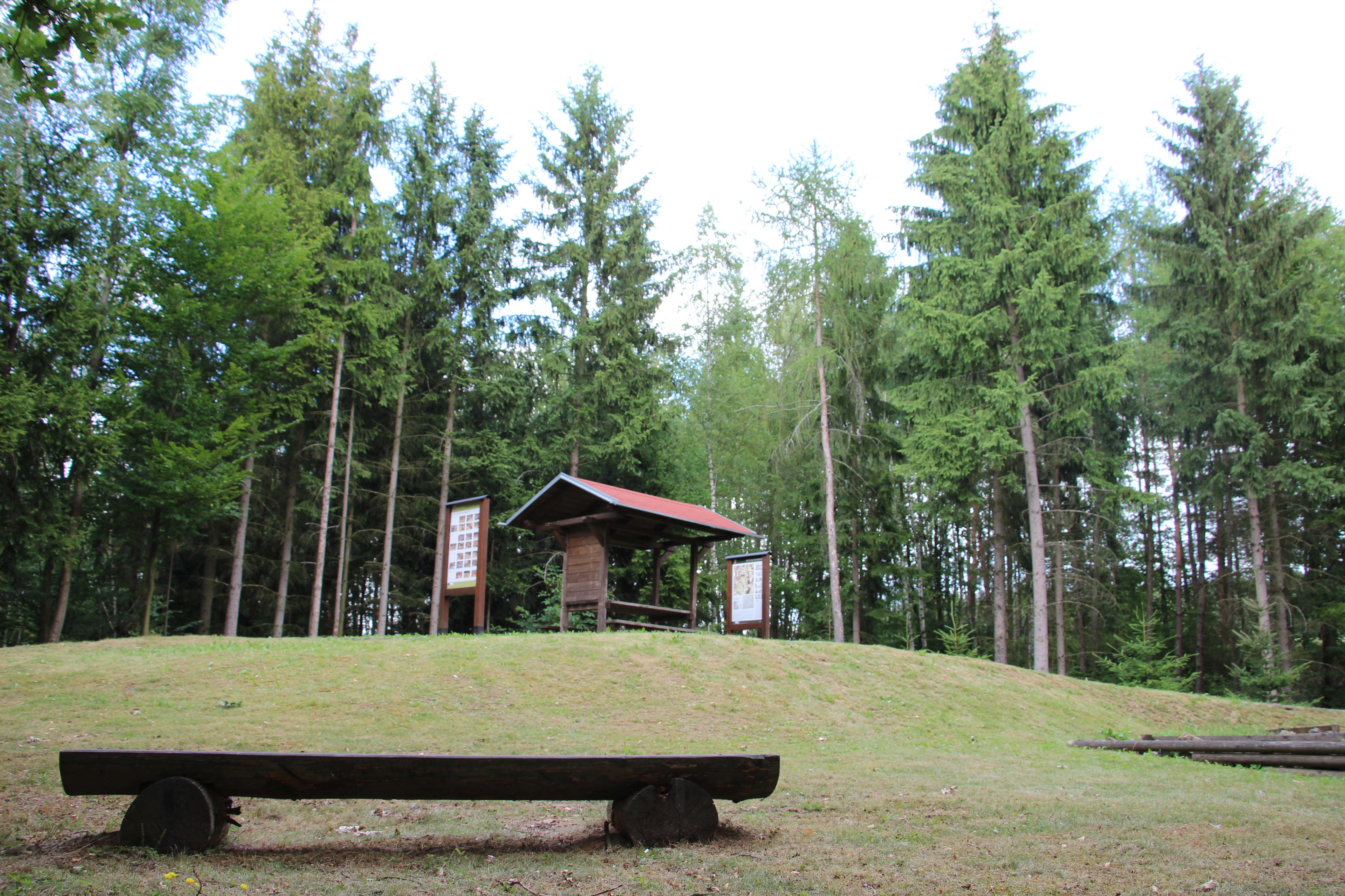 Vrchol s památkově chráněnou zříceninou hrádku Rumberk nad stejnojmennou vesnicí v okrese Blansko.